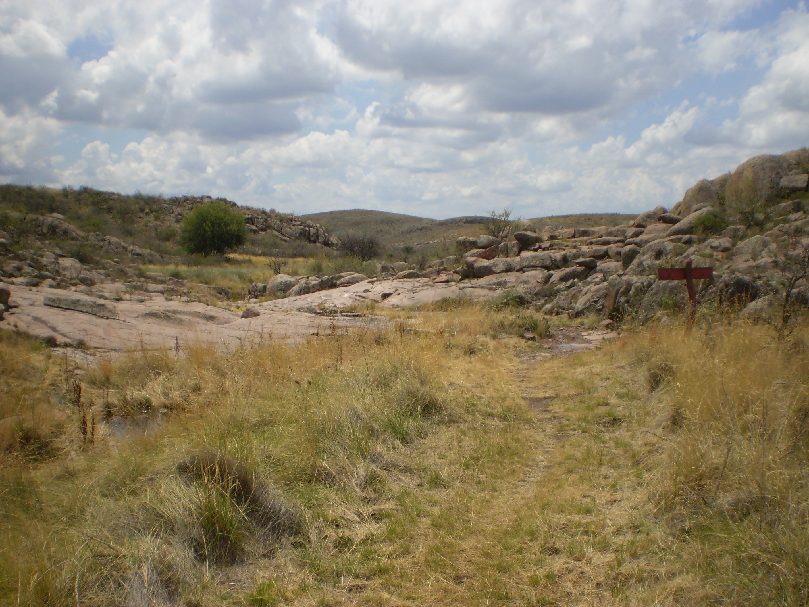 Sendero Valle de las Pinturas en el Parque Nacional Lihué Calel, La Pampa, Argentina